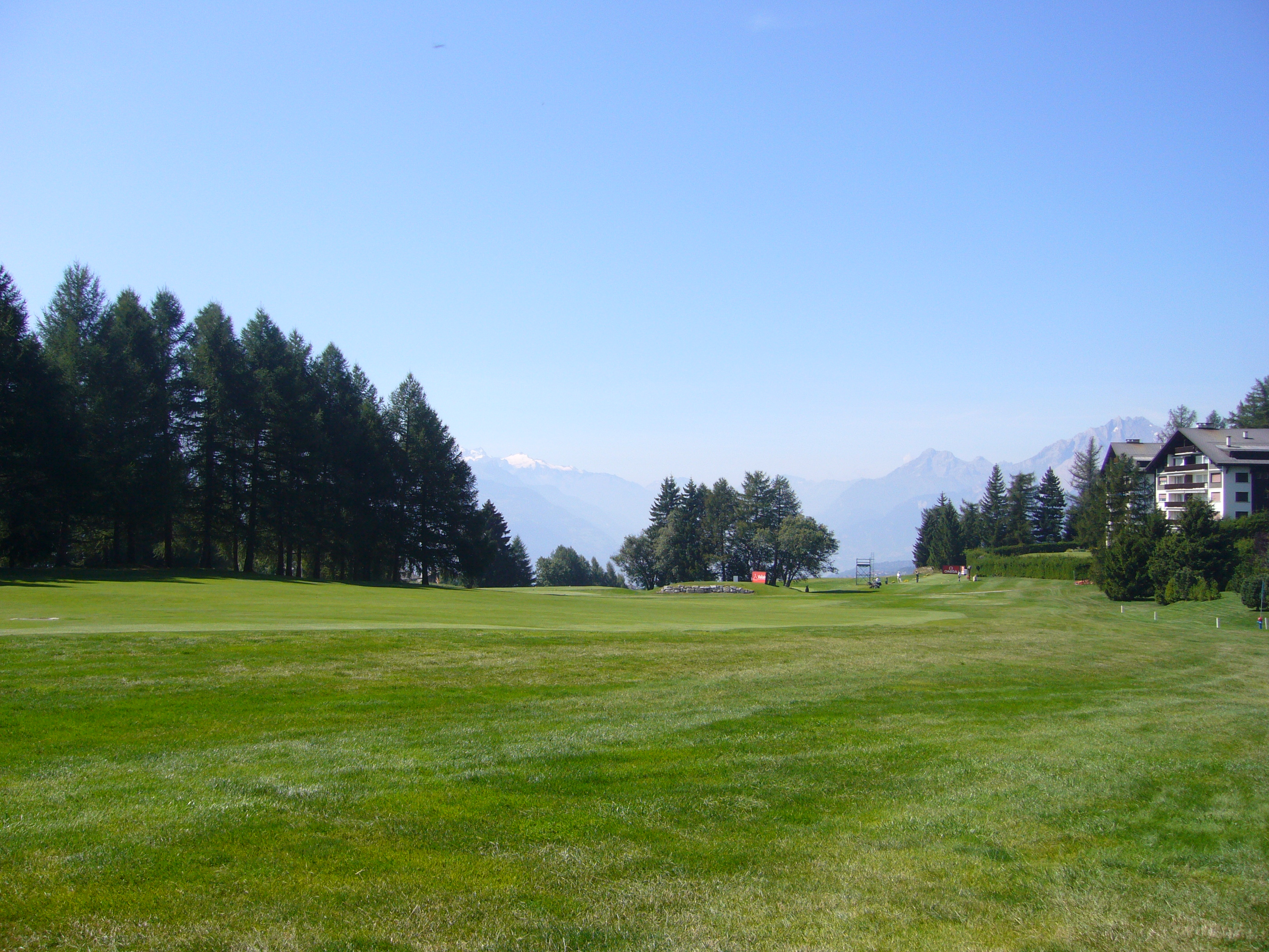 Crans Golfclub, de Alpen achter Hole 9